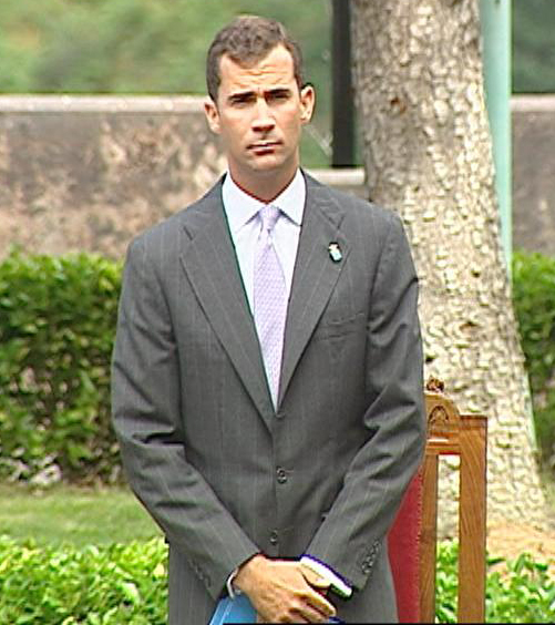 Felipe de Borbón y Grecia in Cuadonga (Asturies - Spain)